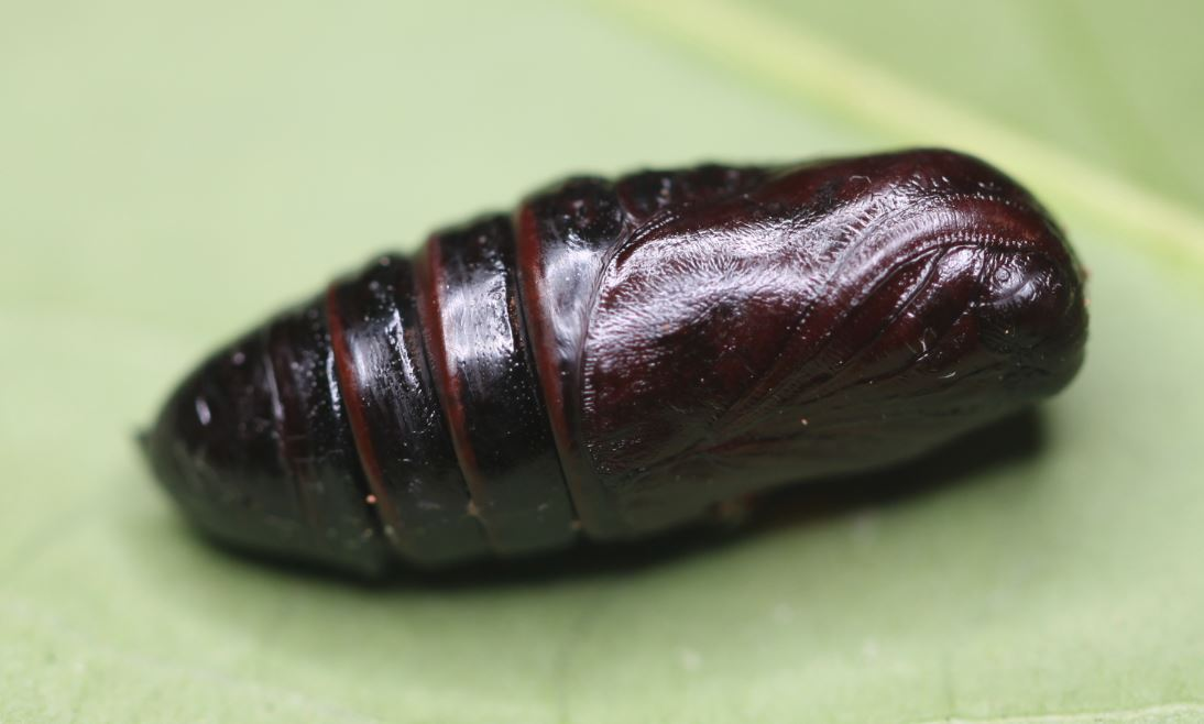 Parasitierte Puppe eines Zickzackspinners (Notodonta ziczac)